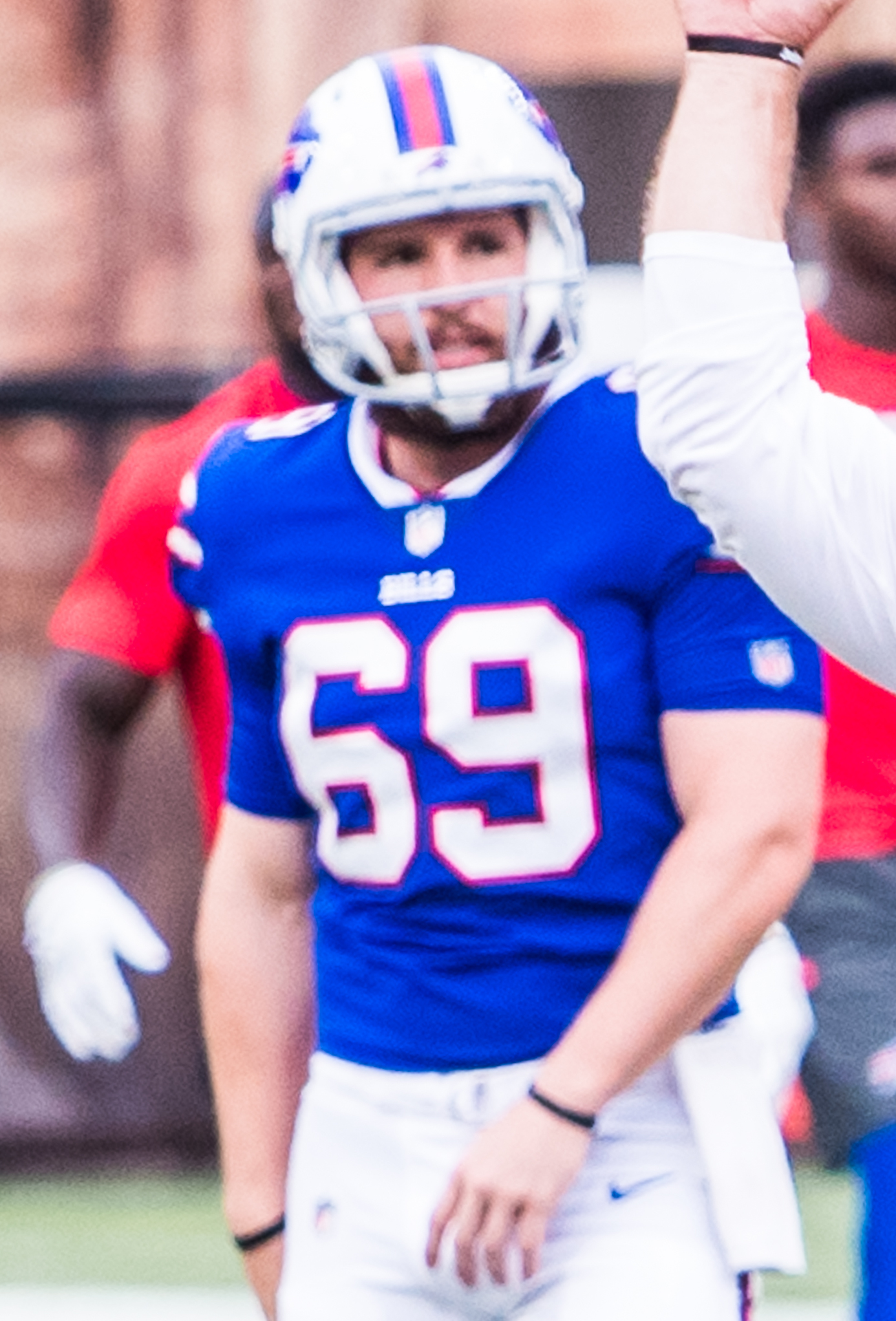 Drew Stanton